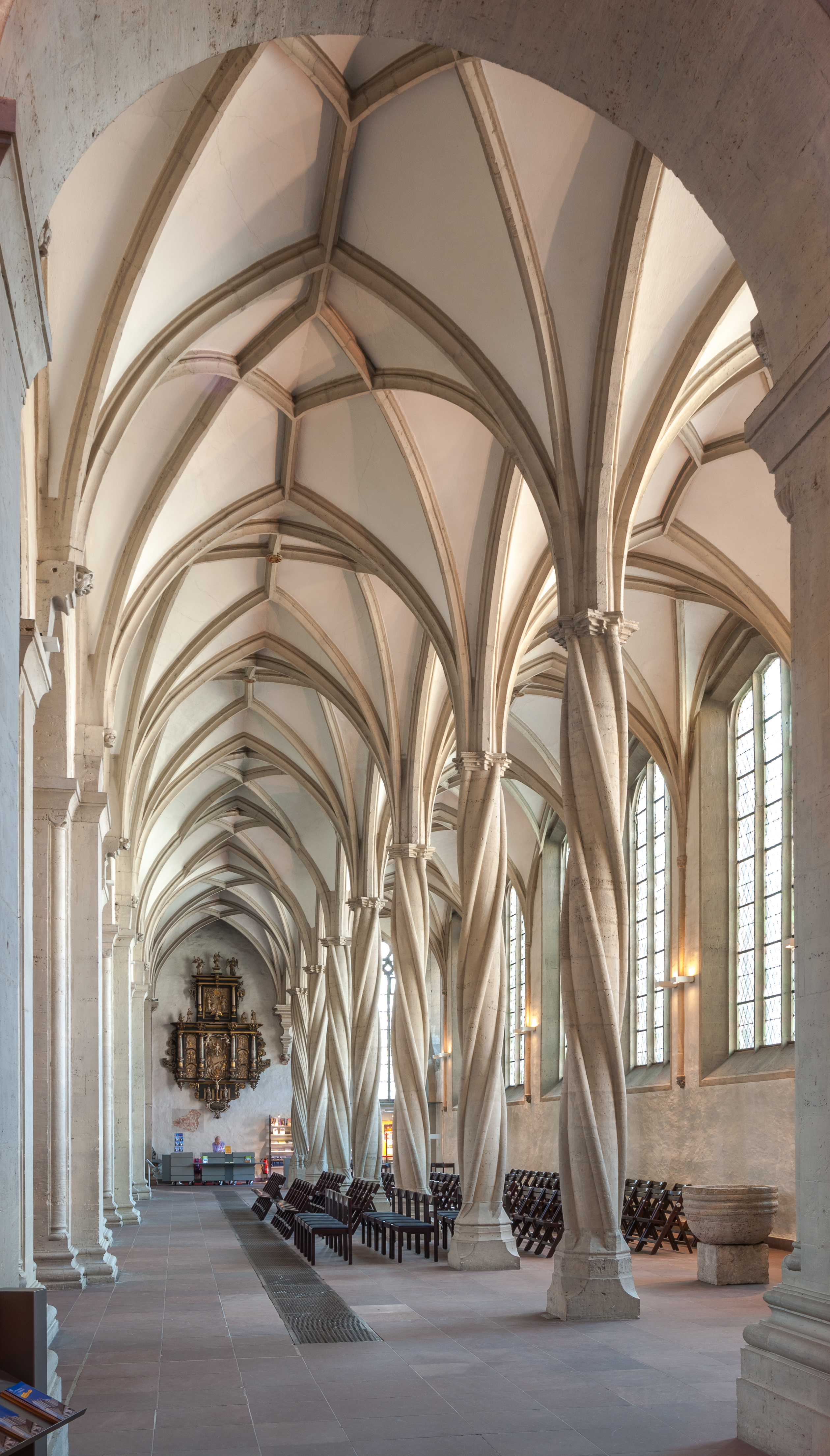 Braunschweiger Dom, Seitenschiff Nord, Niedersachsen/Deutschland